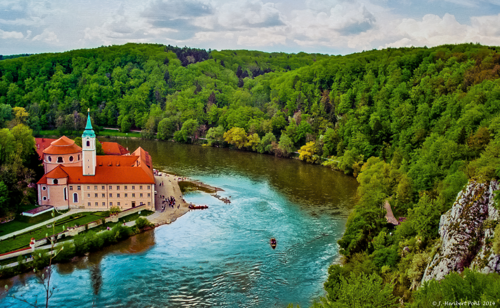 Benediktinerabtei Kloster Weltenburg am Donaudurchbruch Das Kloster wurde um Jahr 617 durch die schottischen Mönche Eustachius und Agilus aus Luxeuil gegründet. Es gilt als ältestes Kloster Bayerns